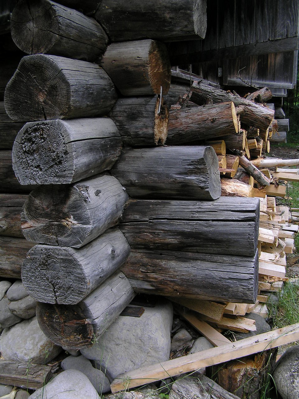 麓郷の森 黒板五郎の丸太小屋 ノッチ部分 Akiyoshi's RoomP6220392